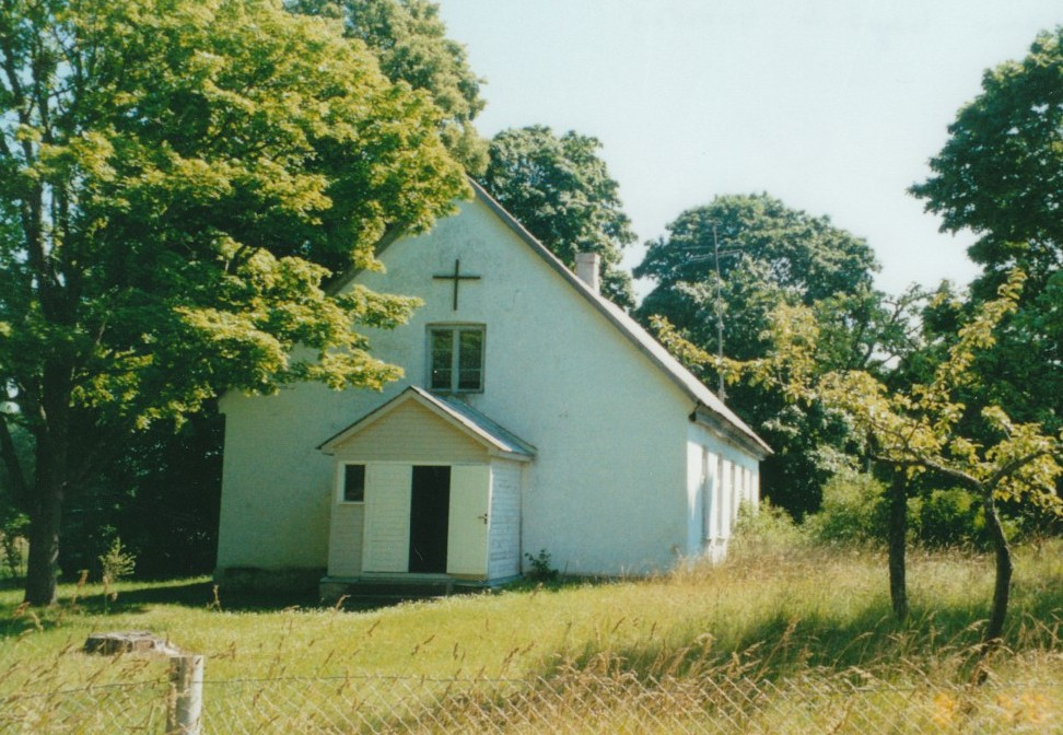 Uguņciema baptist baznīca